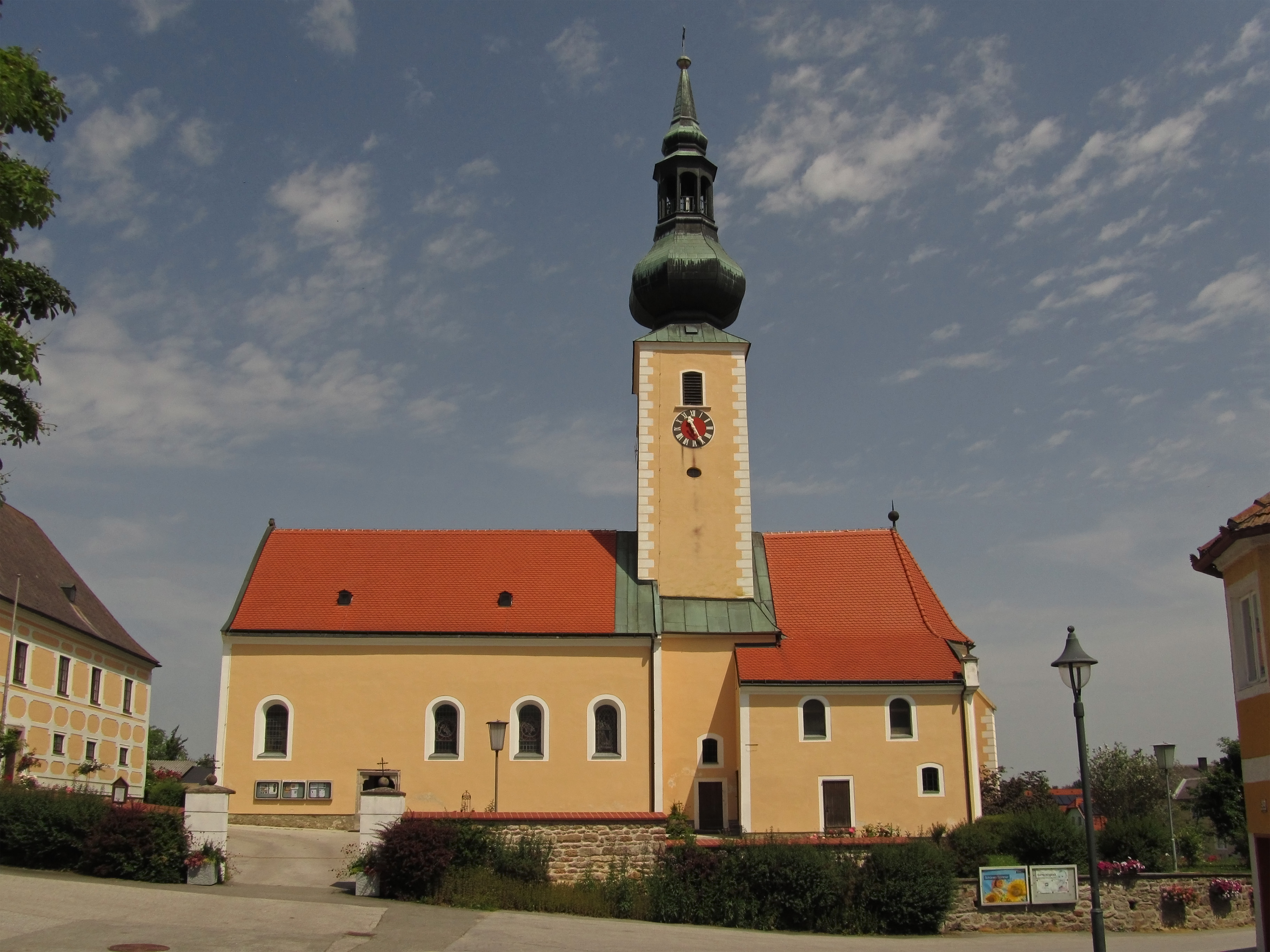 Die ursprünglich romanische Kirche wurde im 15. Jahrhundert durch einen spätgotischen Chor und den Einbau einer Halle verändert. Das Altarblatt am spätbarocken Hochaltar stammt von Martin Johann Schmidt.